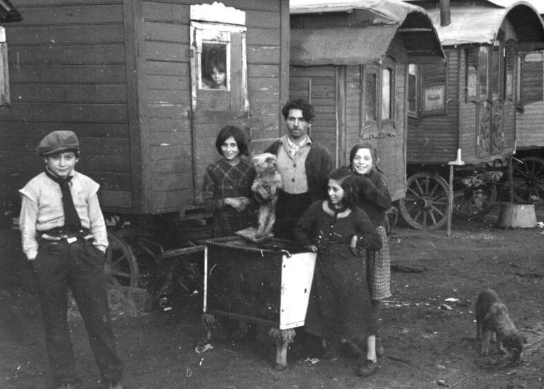 27.12.37 Köln [Zigeunerlager]